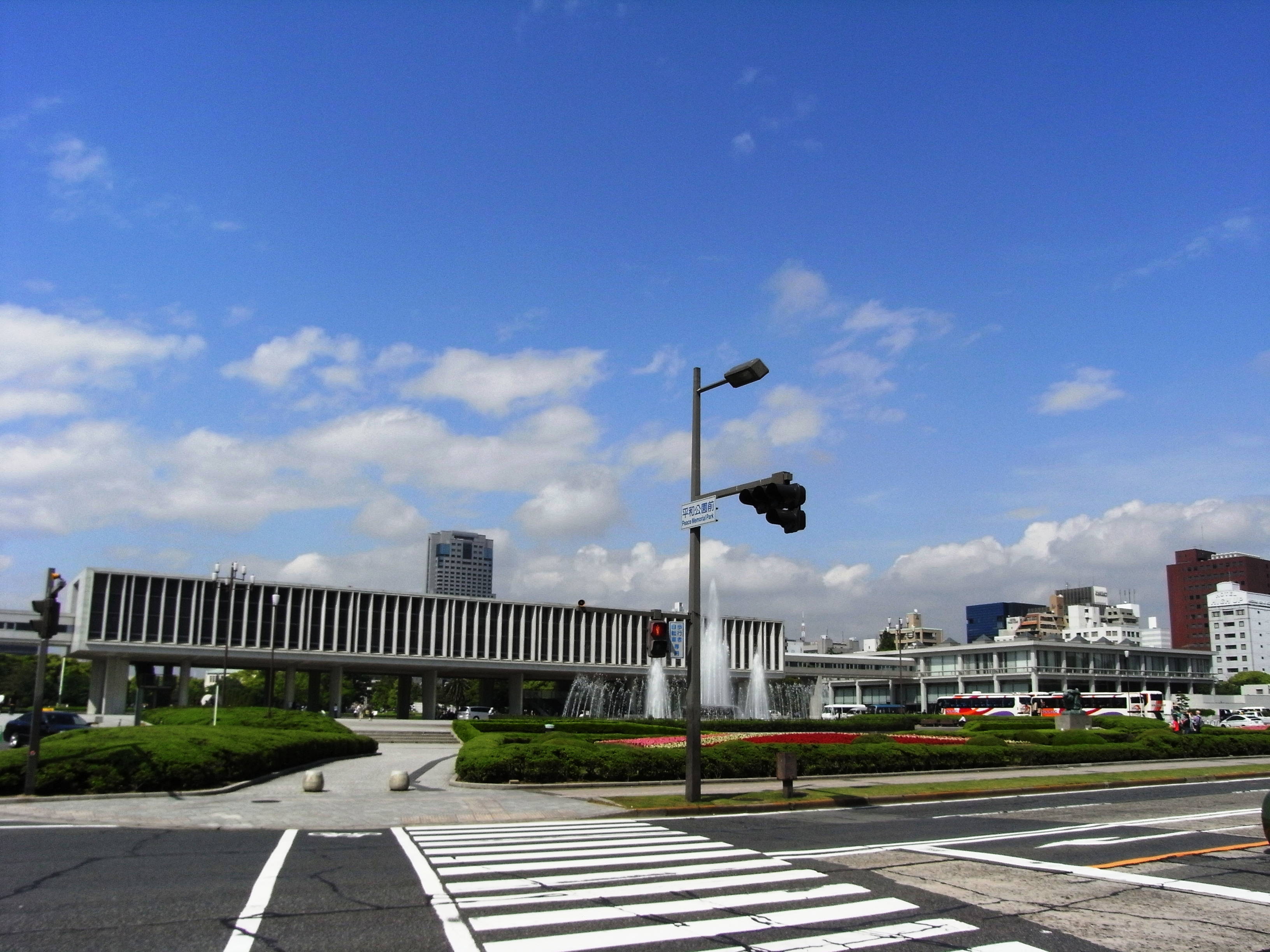 Hiroshima Peace Memorial Museum(広島平和記念資料館)